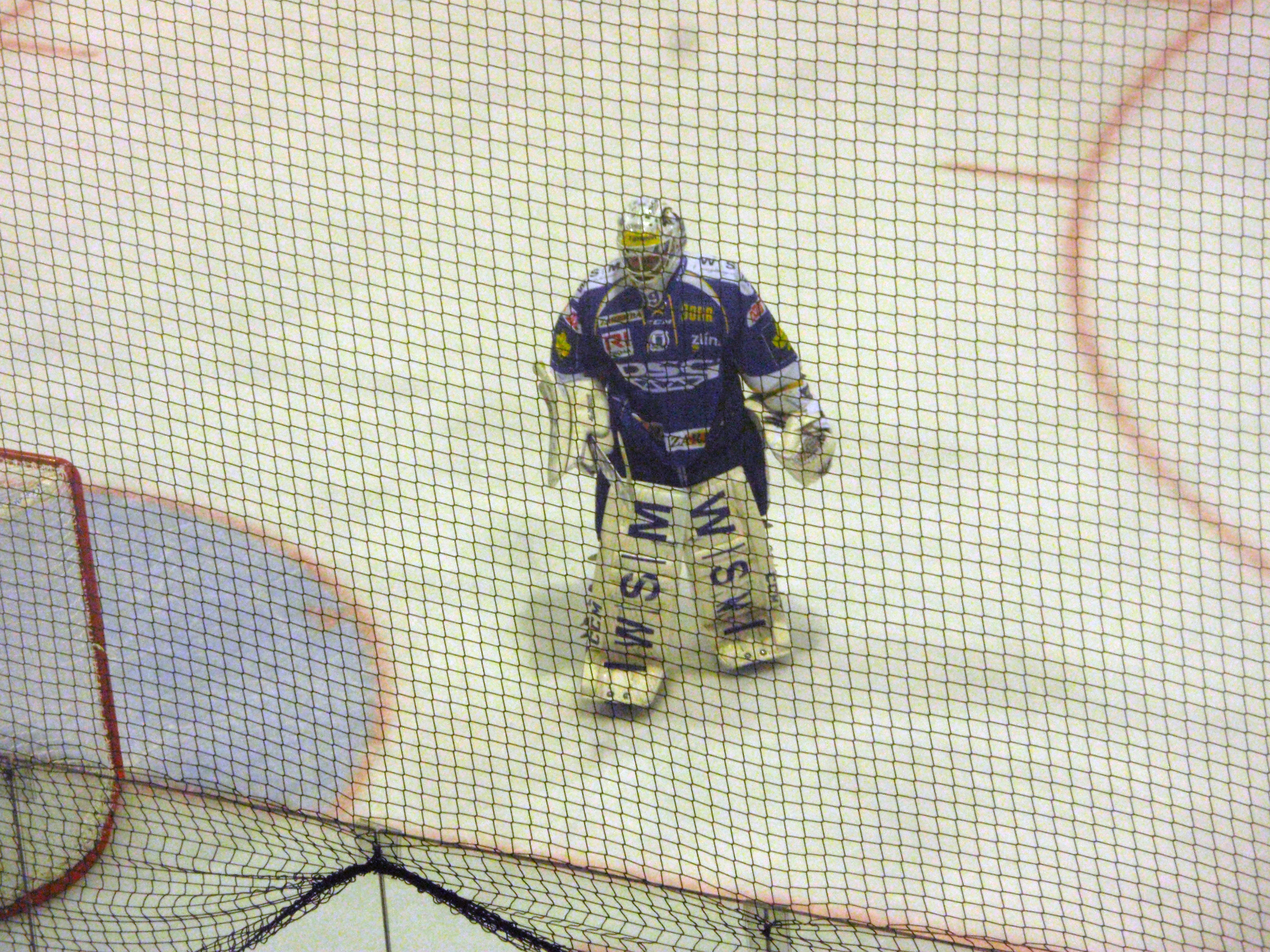 Zlínský brankář Libor Kašík v Olomouci